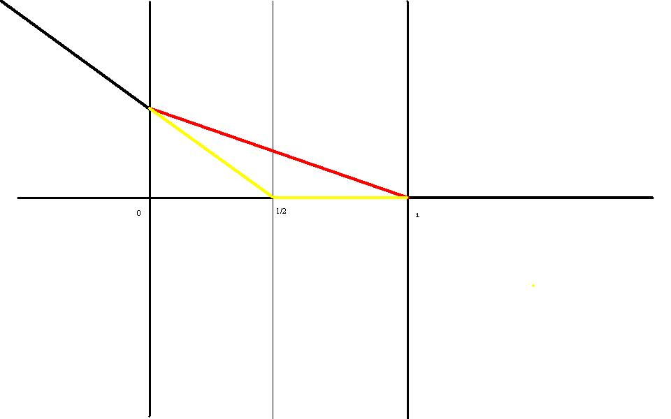 fonction mu (théorie de la fonction zeta de Riemann)